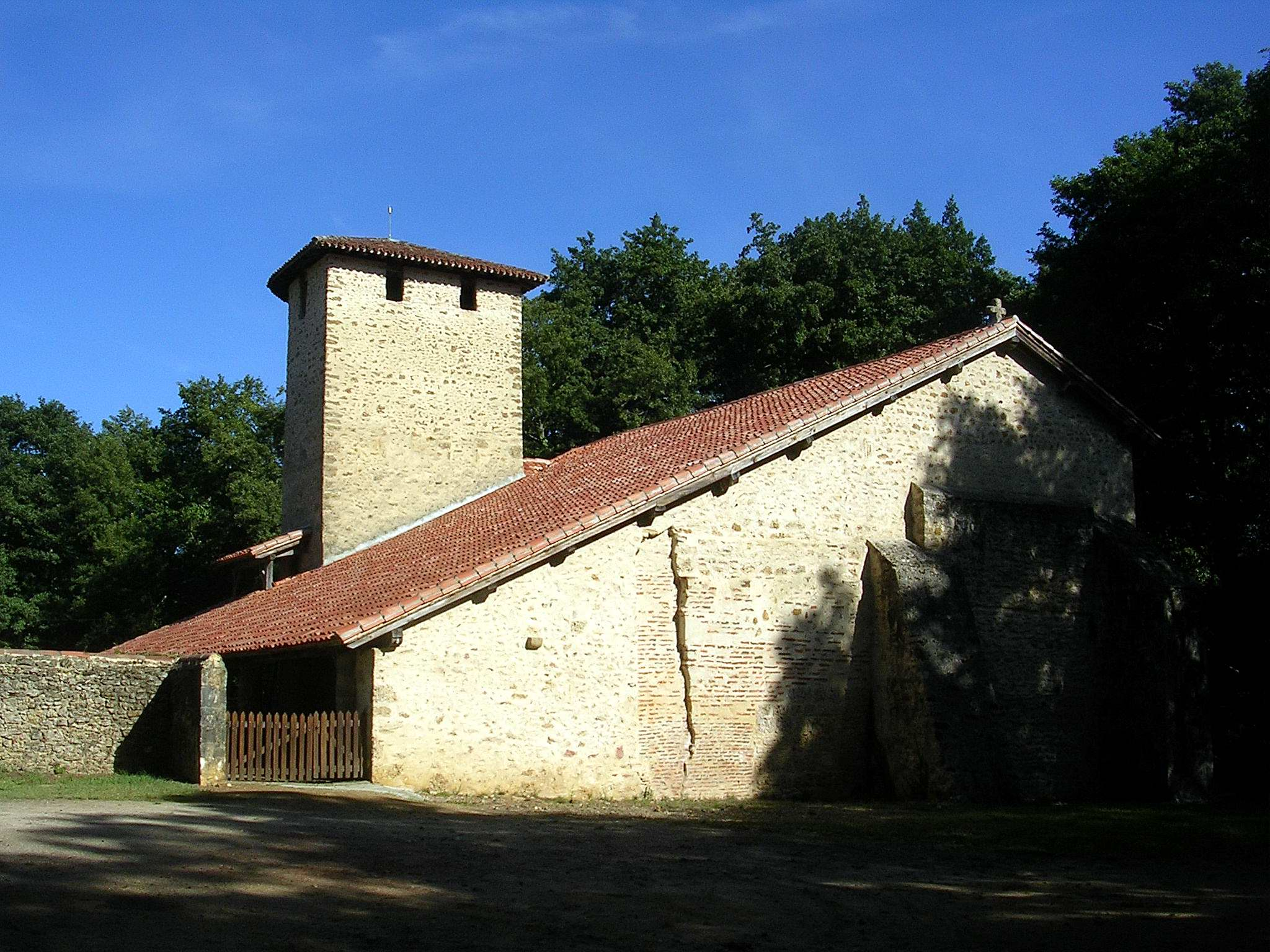 Église Notre-Dame de l’Assomption de Beaussiet, sur la commune de Mazerolles, dans le département français des Landes